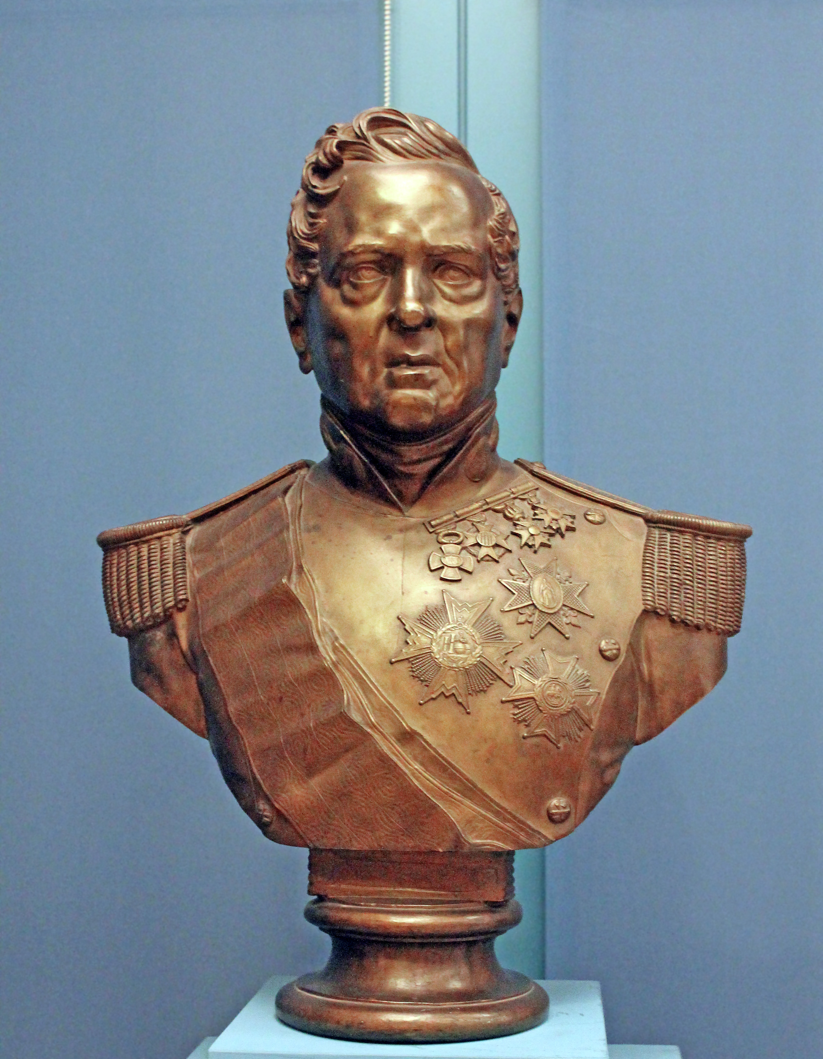 Depicted person: Francisco Javier de Sentmenat-Oms y de Santa Pau.